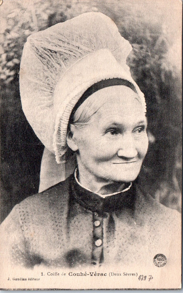 Coiffe de Couhé-Vérac début XXe siècle.